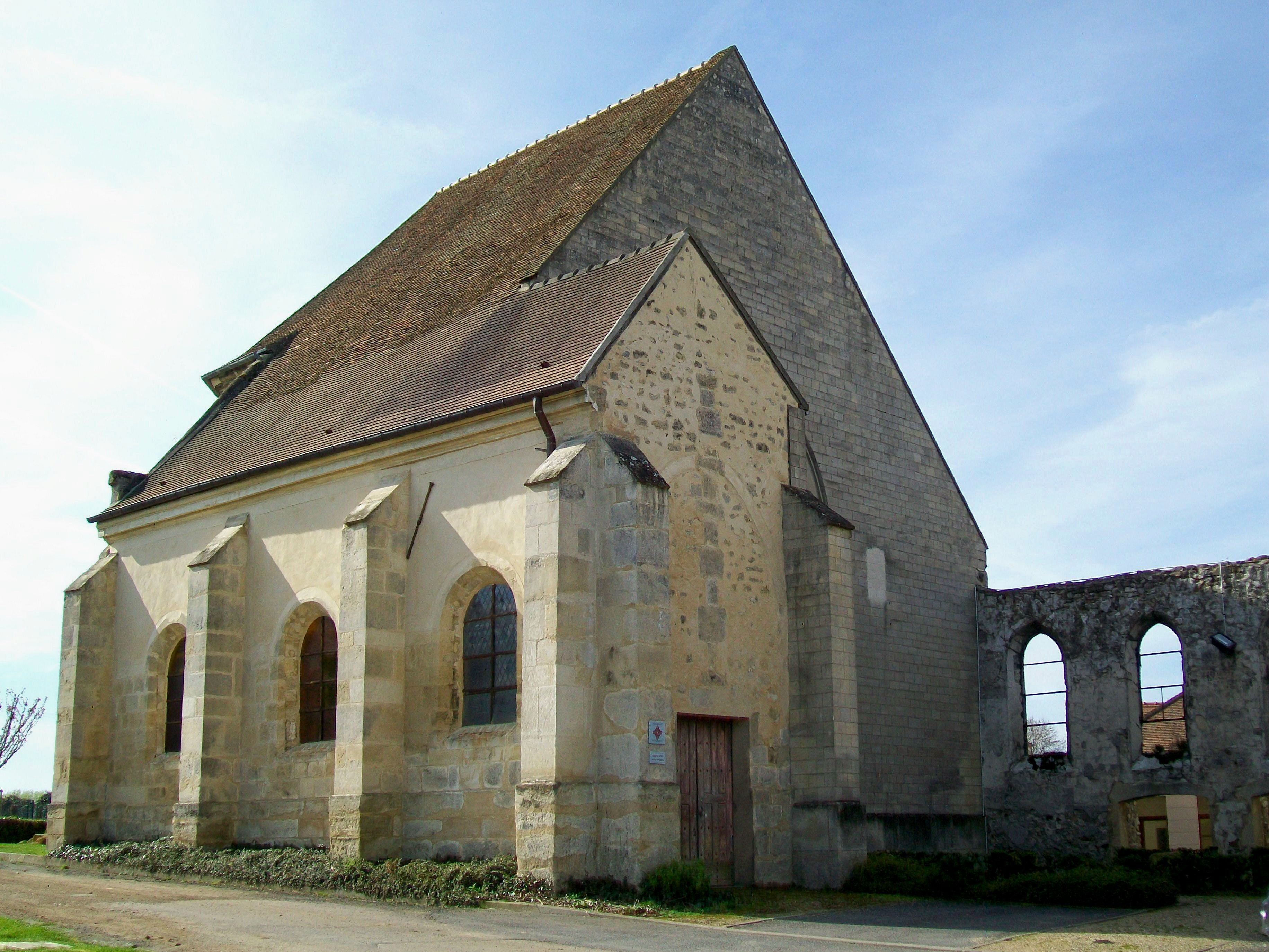 La couverture et la charpente de la nef du XVe siècle se sont éffondrées, ce qui a entraîne la démolition de la moitié de l'édifice en 1955. C'est après que l'église a été classée : le 28 avril 1980.